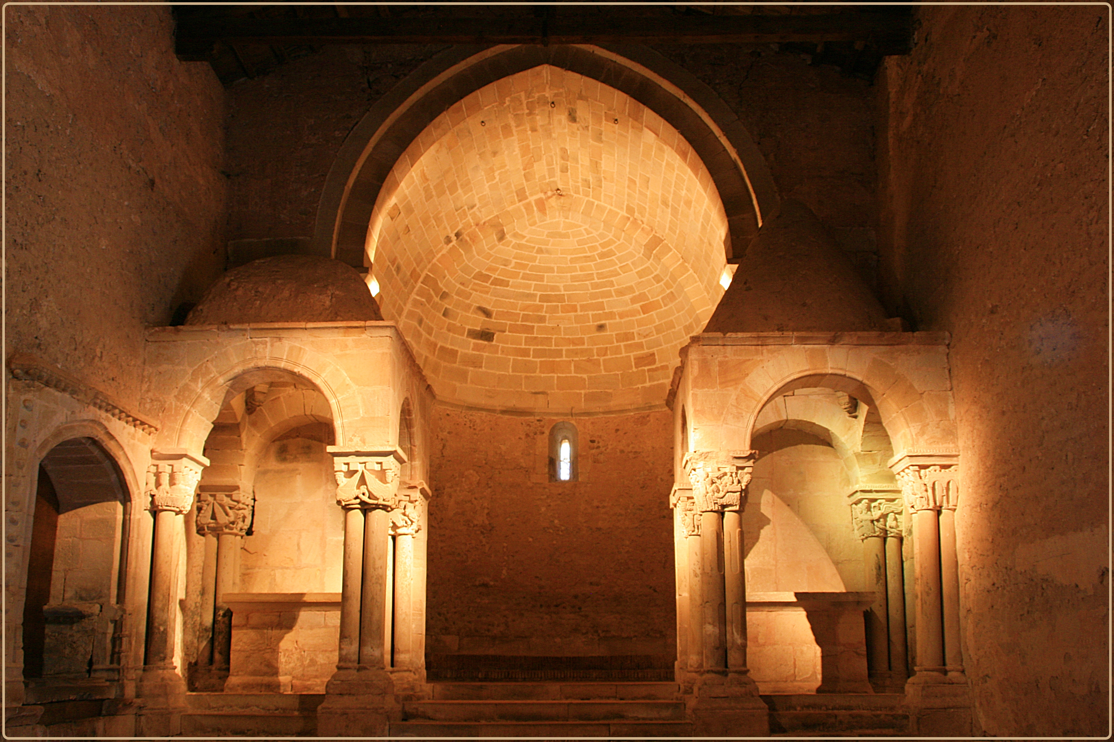 Monasterio de San Juan de Duero (Soria)El monasterio pertenecio a la Orden militar de los Hospitalarios de San Juan de Jerusalén o caballeros sanjuanistas levantado en la primera mitad del siglo XII a orillas del río Duero y que se mantuvo habitado hasta el siglo XVIII. Iglesia de una sola nave con presbiterio y ábside; aquél, con bóveda de medio cañón apuntado, y éste, semicircular con bóveda de horno.